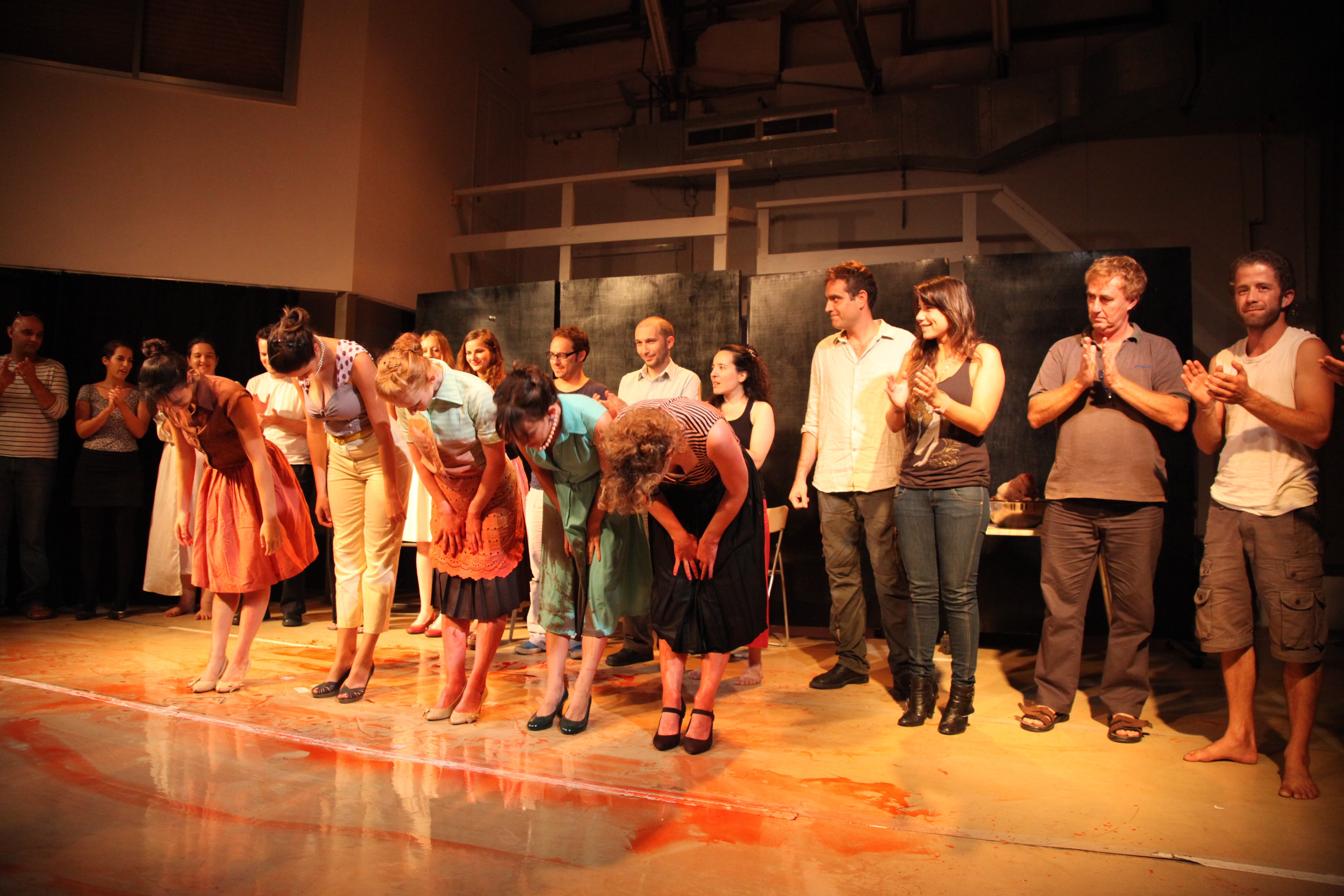 קורס בסדנאות הבמה